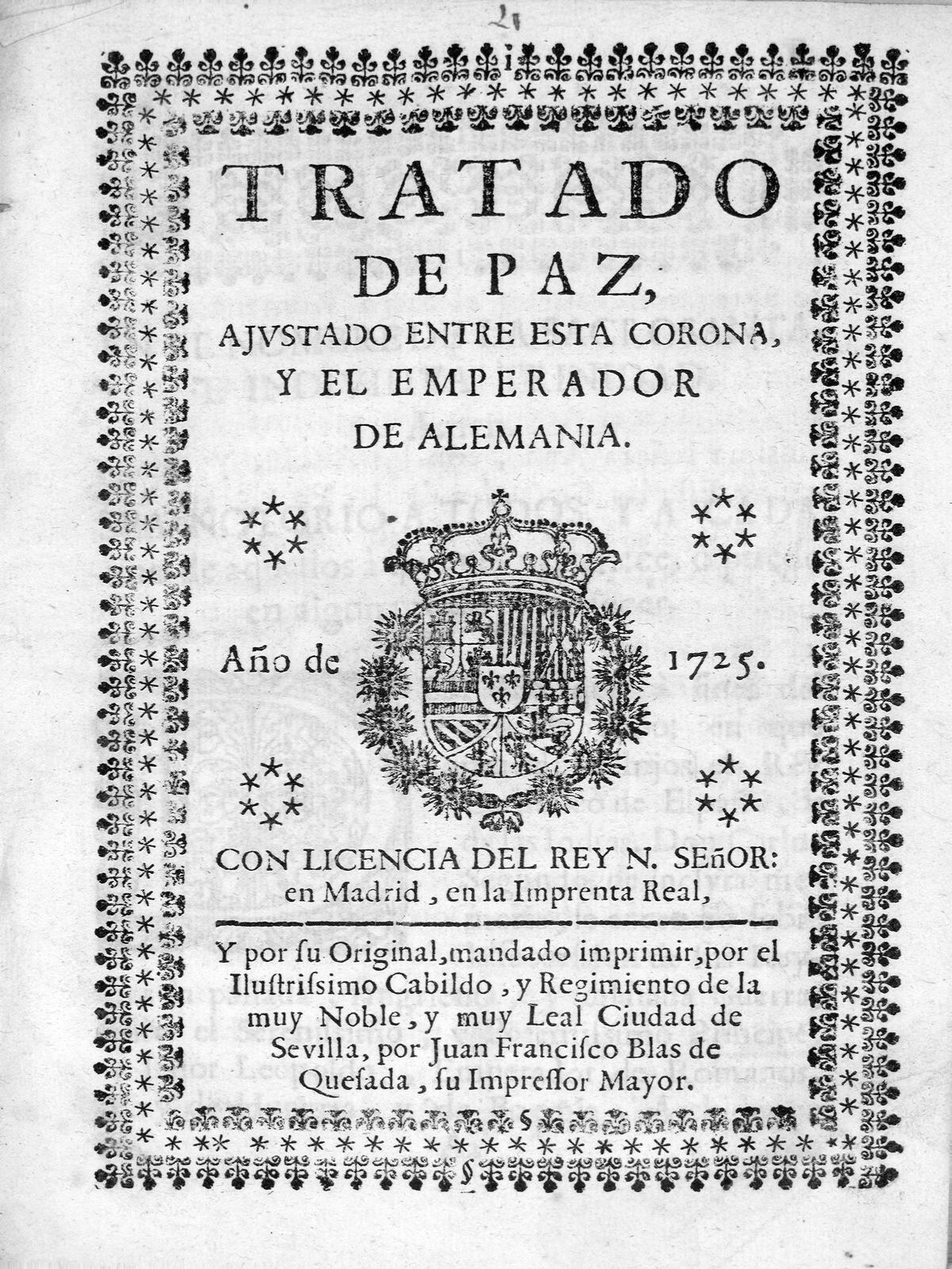 Tratado Viena 1725